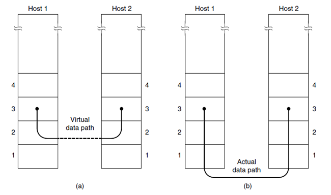 Mənbə maşınında sanki bir müəssisə var, eyni şəbəkə qatında, birbaşa təyinat nöqtəsinə ötürülməsi bitləri çatdırmaq bir proses adlanır.